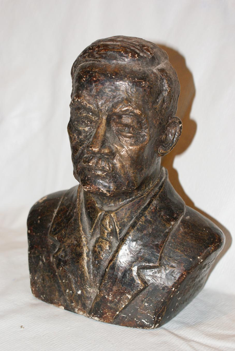 Roman Dmowski, popiersie, model w wykonaniu Ferdynanda Jarochy